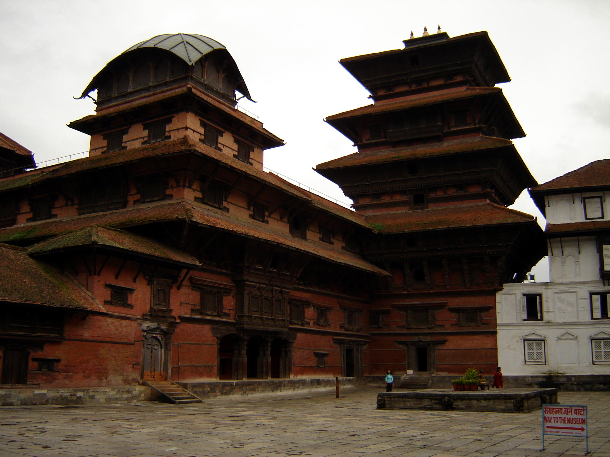 Stary pałac królewski w Kathmandu